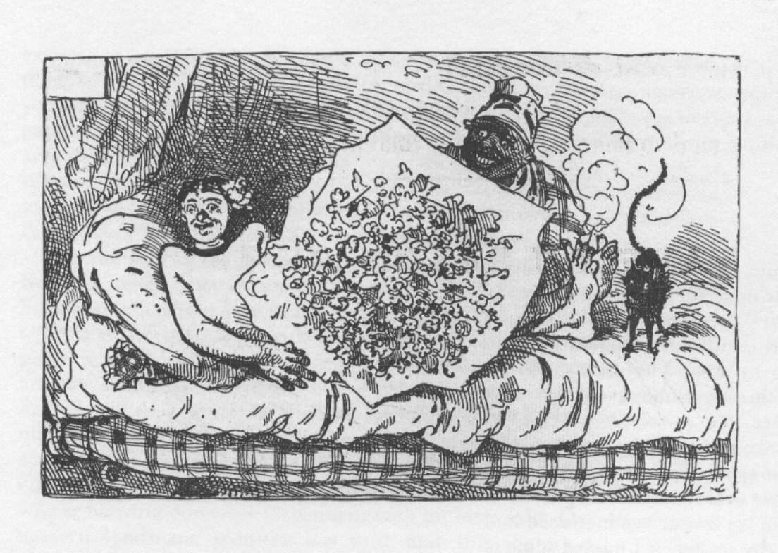 Karikatur zu Olympia von Edouard Manet